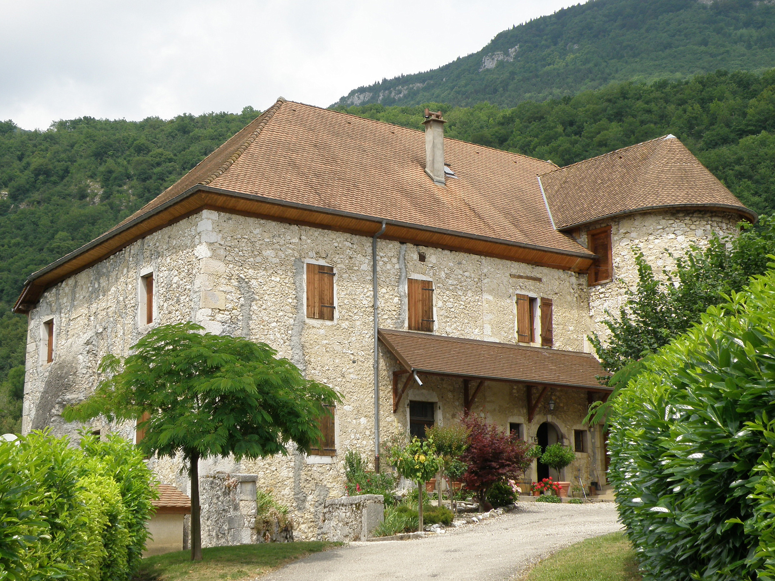 Saint-Jean-de-Chevelu, comm. du département de la Savoie (région Rhône-Alpes, France). Château de Bergin.